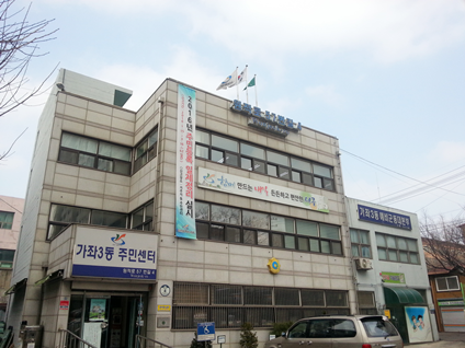 가좌3동 주민센터